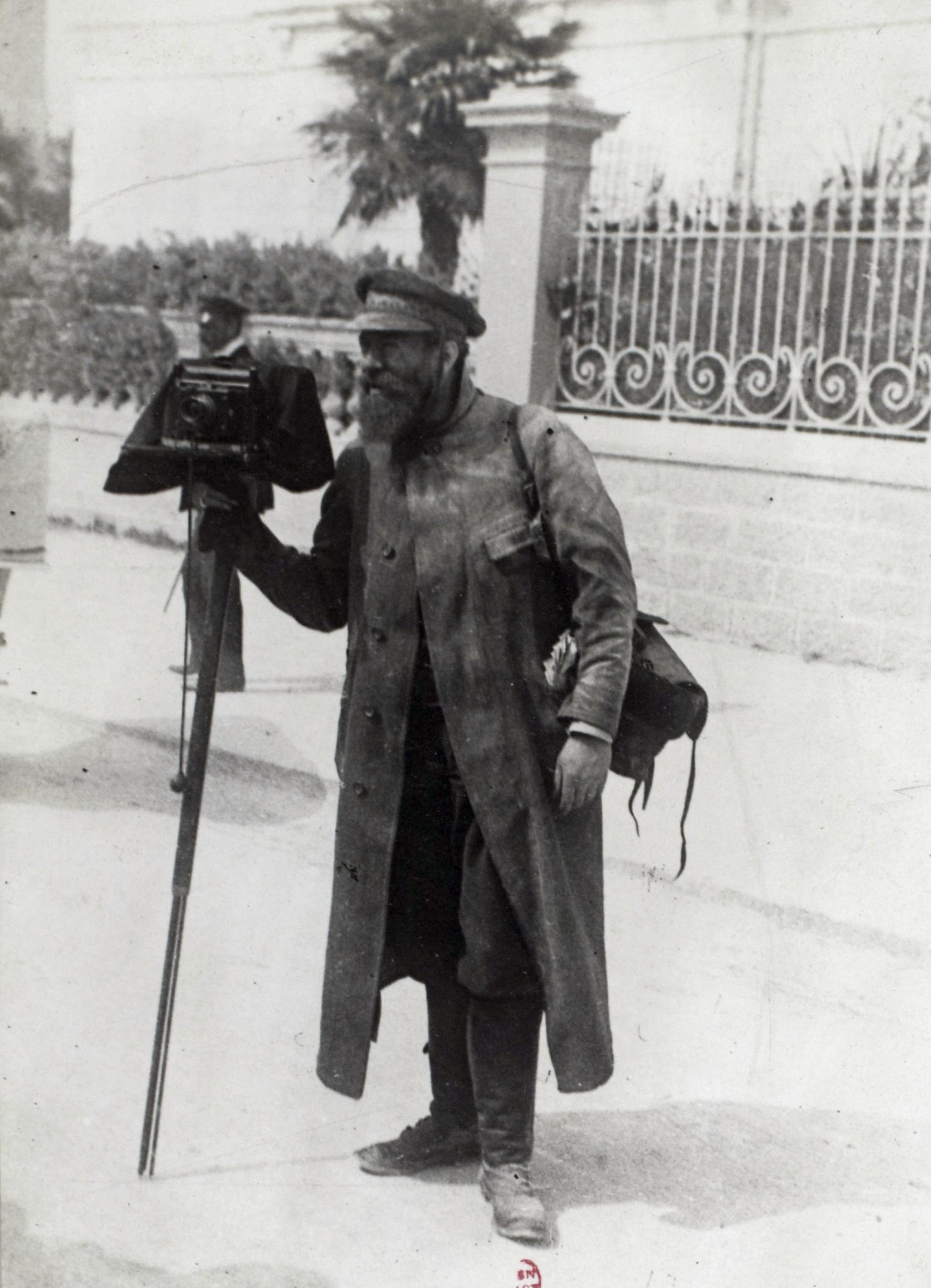 Jules Beau en 1902 [Collection Jules Beau. Photographie sportive] : T. 17. Année 1902 / Jules Beau : F. 22. Jules Beau ; [Sans titre]